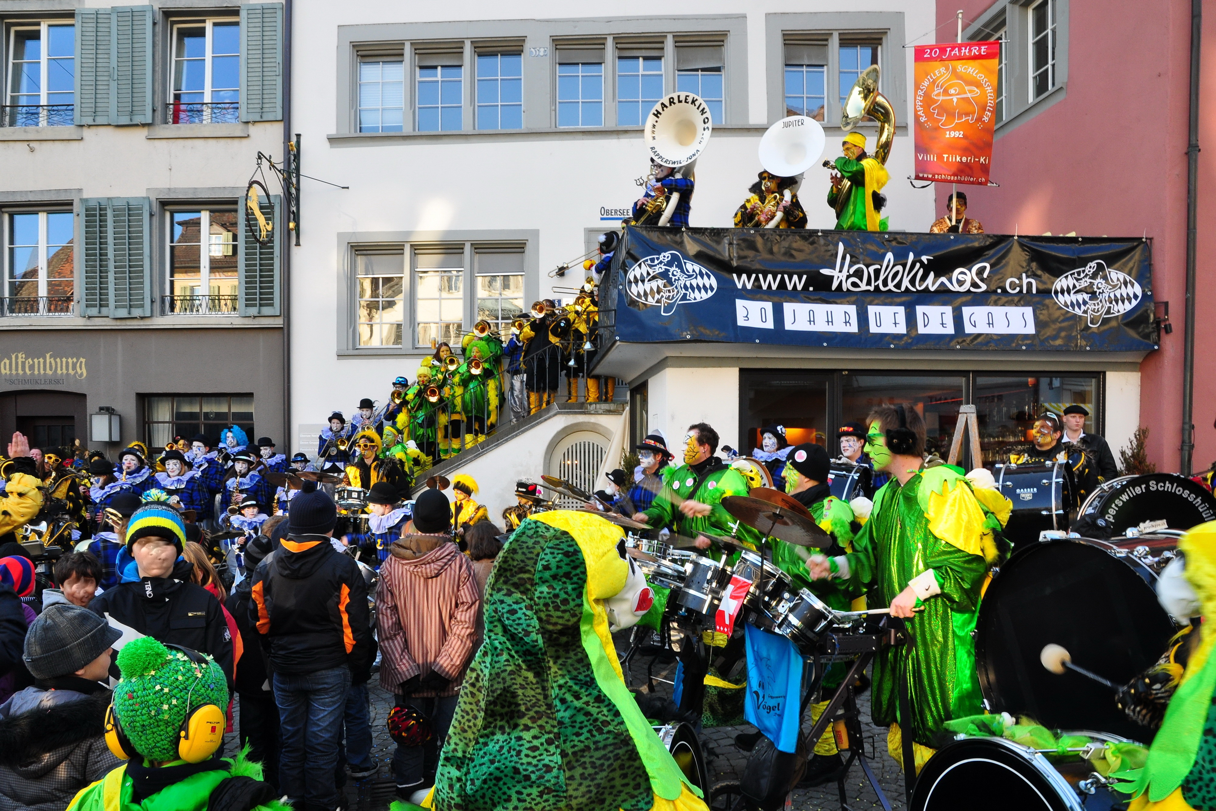 Eis-zwei-Geissebei, local politicians Guggenmusik at Rathaus respectively Hauptplatz square in Rapperswil (Switzerland)